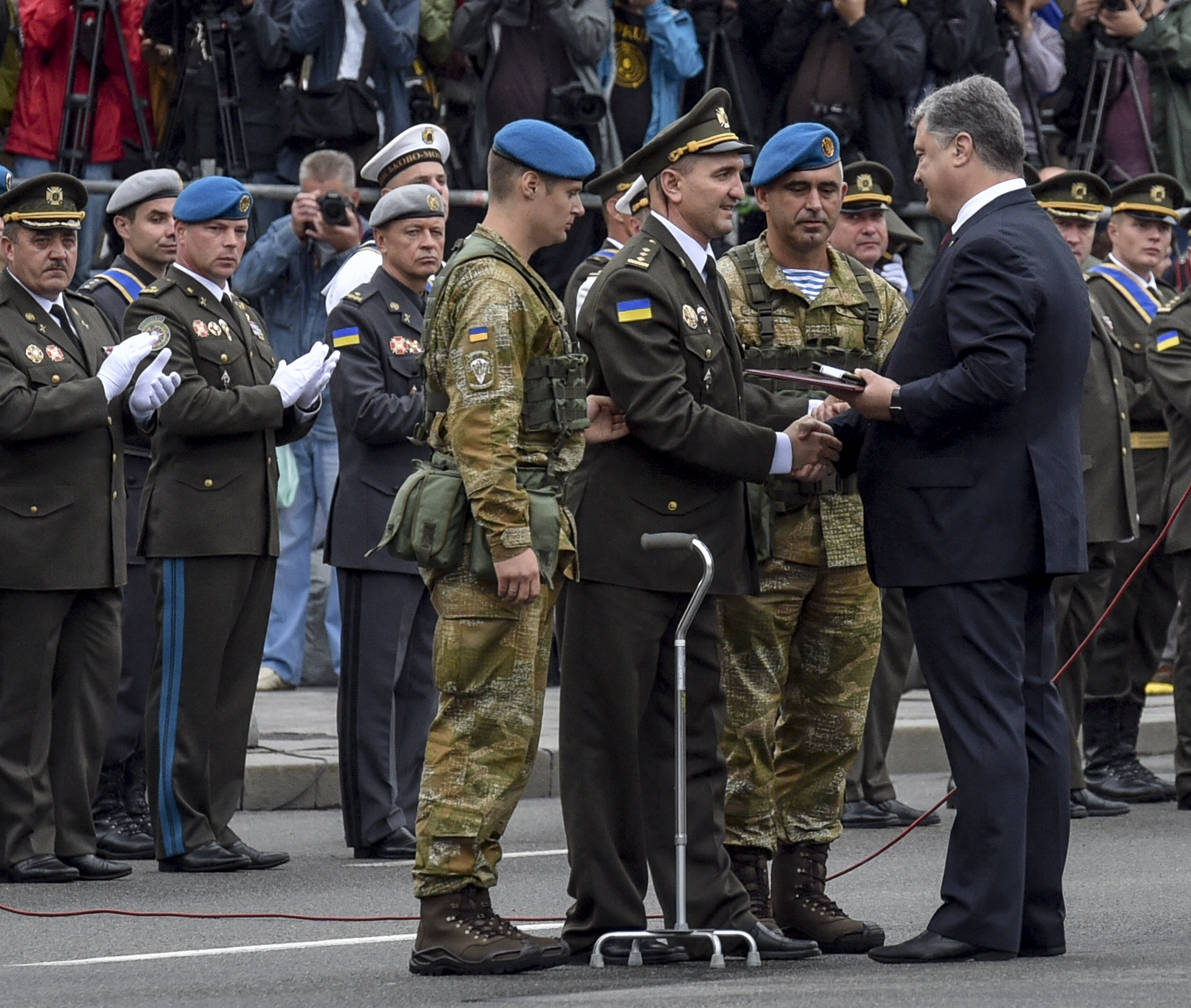 Нагородження Гордійчука Ігоря Володимировича. Парад на честь 25-річчя незалежності України, Київ, 2016 рік.